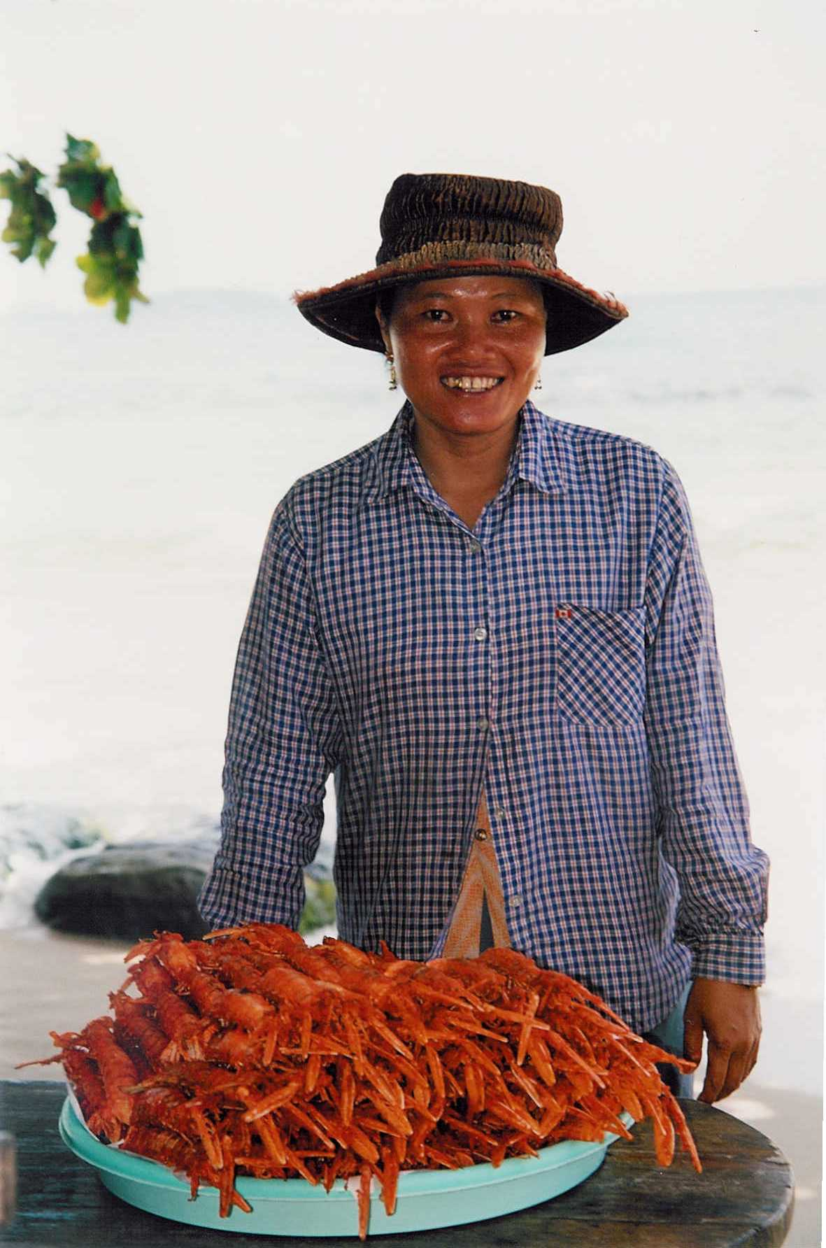 Kambodschanerin mit frischem Hummer am Strand von Sihanoukville Artikelvorschläge: Kambodscha;Sihanoukville;kambodschanische Küche;Kambodschaner;Meeresfrüchte Quelle: selbst fotografiert Fotograf: Thomas Pätzold (paetzoldthomas) Datum: September 2004 andere Versionen: keine